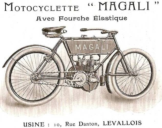 Motocyclette Magali des établissements Gayon & Cie à Levallois vers 1905.